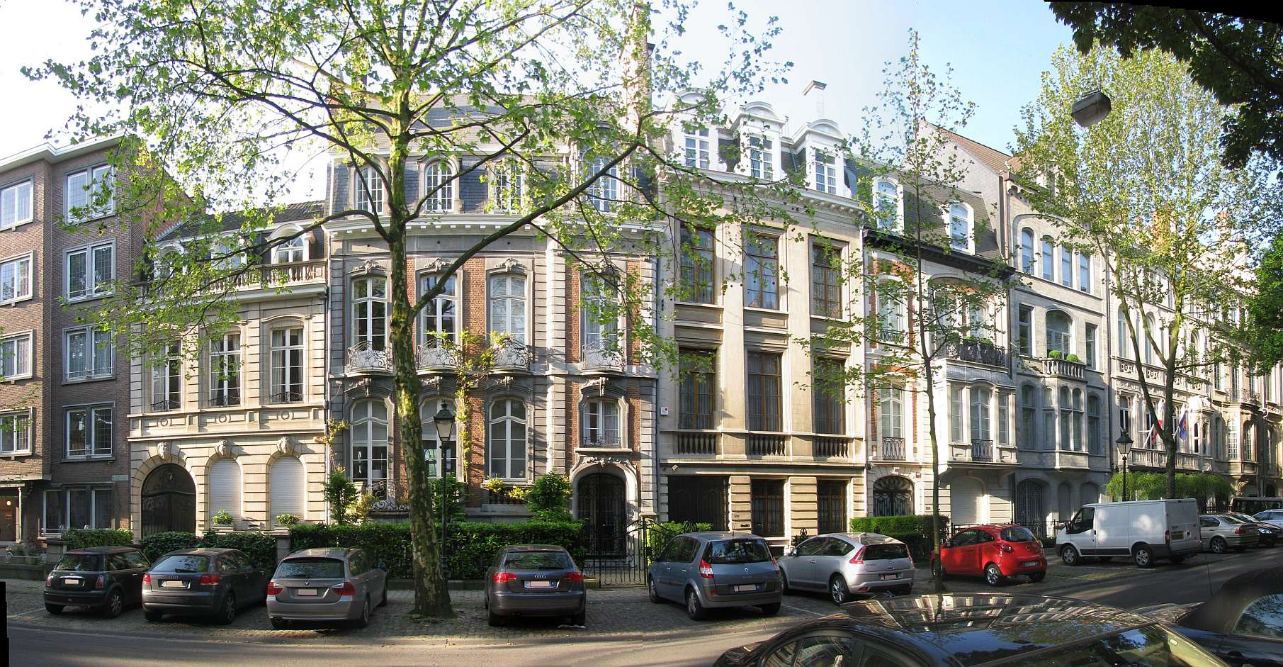 Ixelles, av.Molière, Hôtels particuliers, le 305 par Alf.Frère en 1912, le 297 par Fern.Symons en 1911